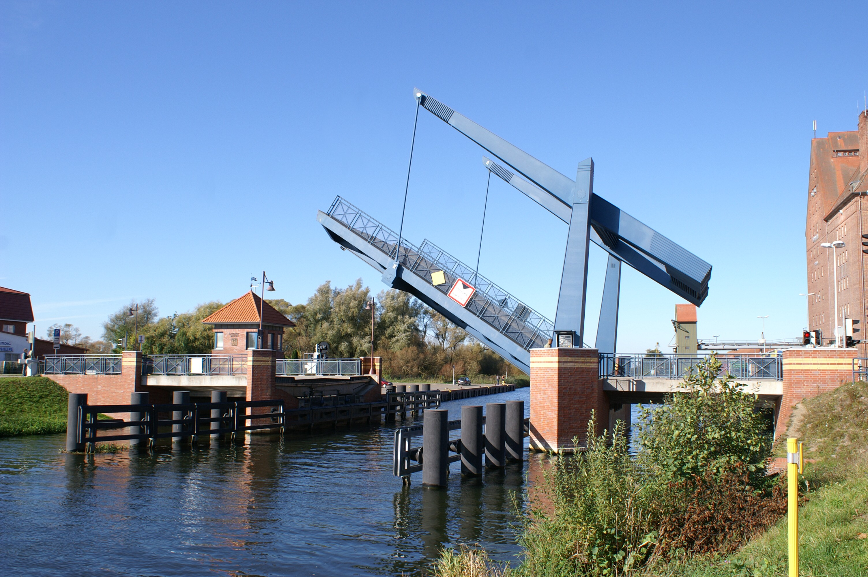 Demmin - Kahldenbrücke über die Peene, Absenkvorgang